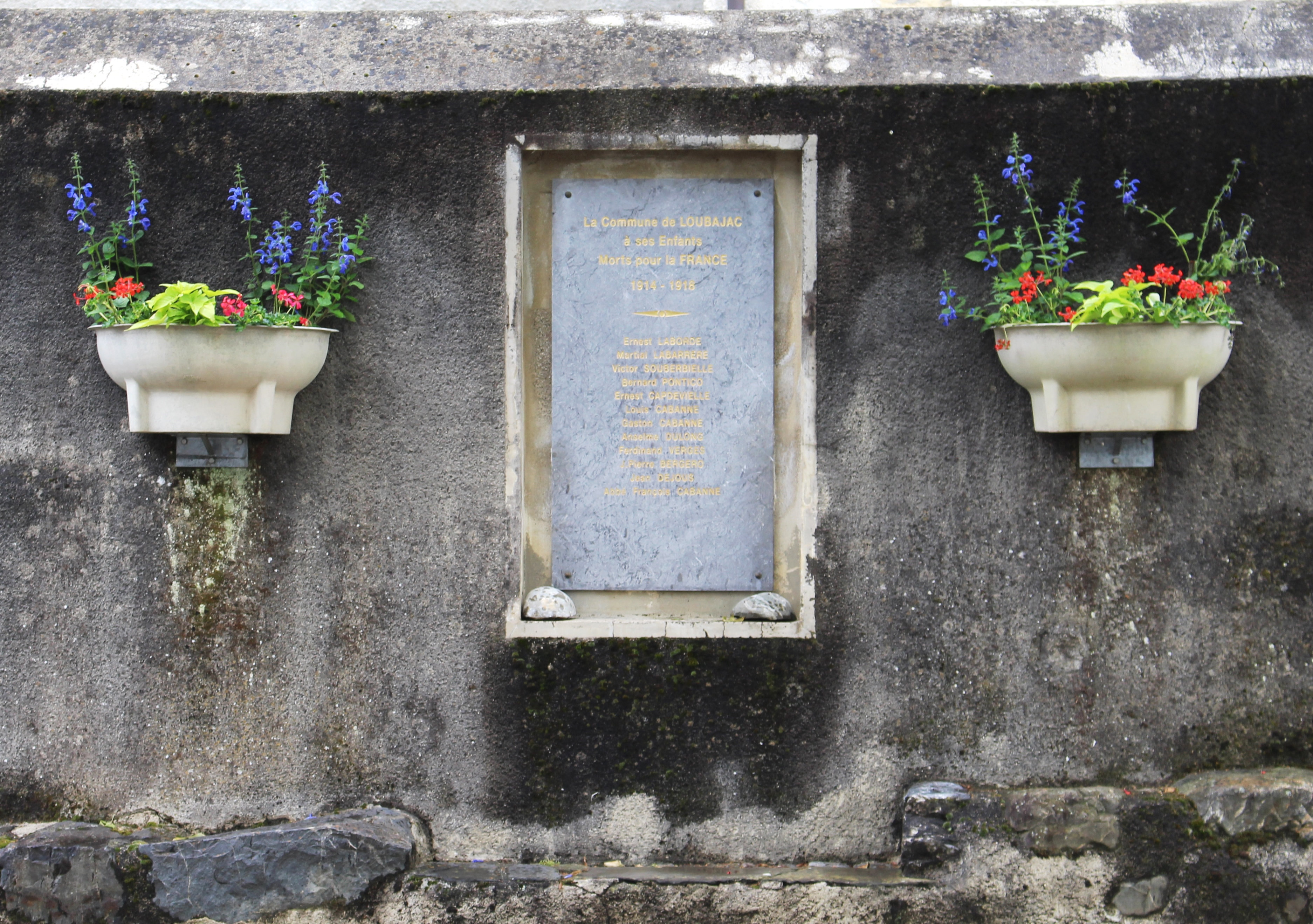 Monument aux morts de Loubajac (Hautes-Pyrénées)